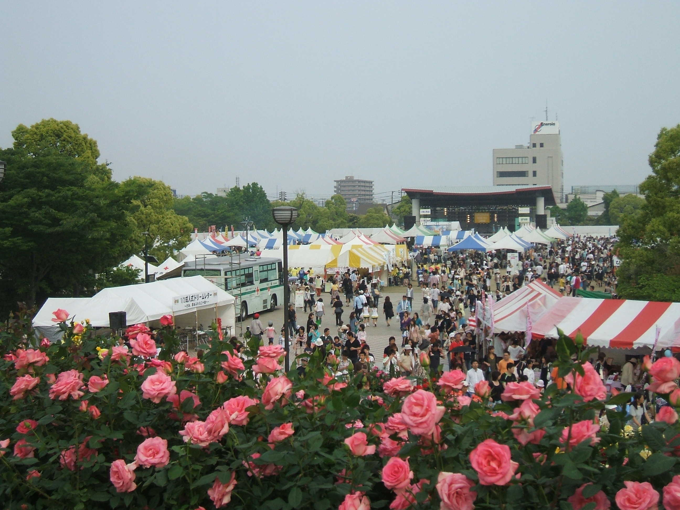 緑町公園においての屋台などの2008年の福山ばら祭の様子。